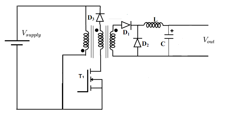 Базовий прямоходовий одноконтактний перетворювач